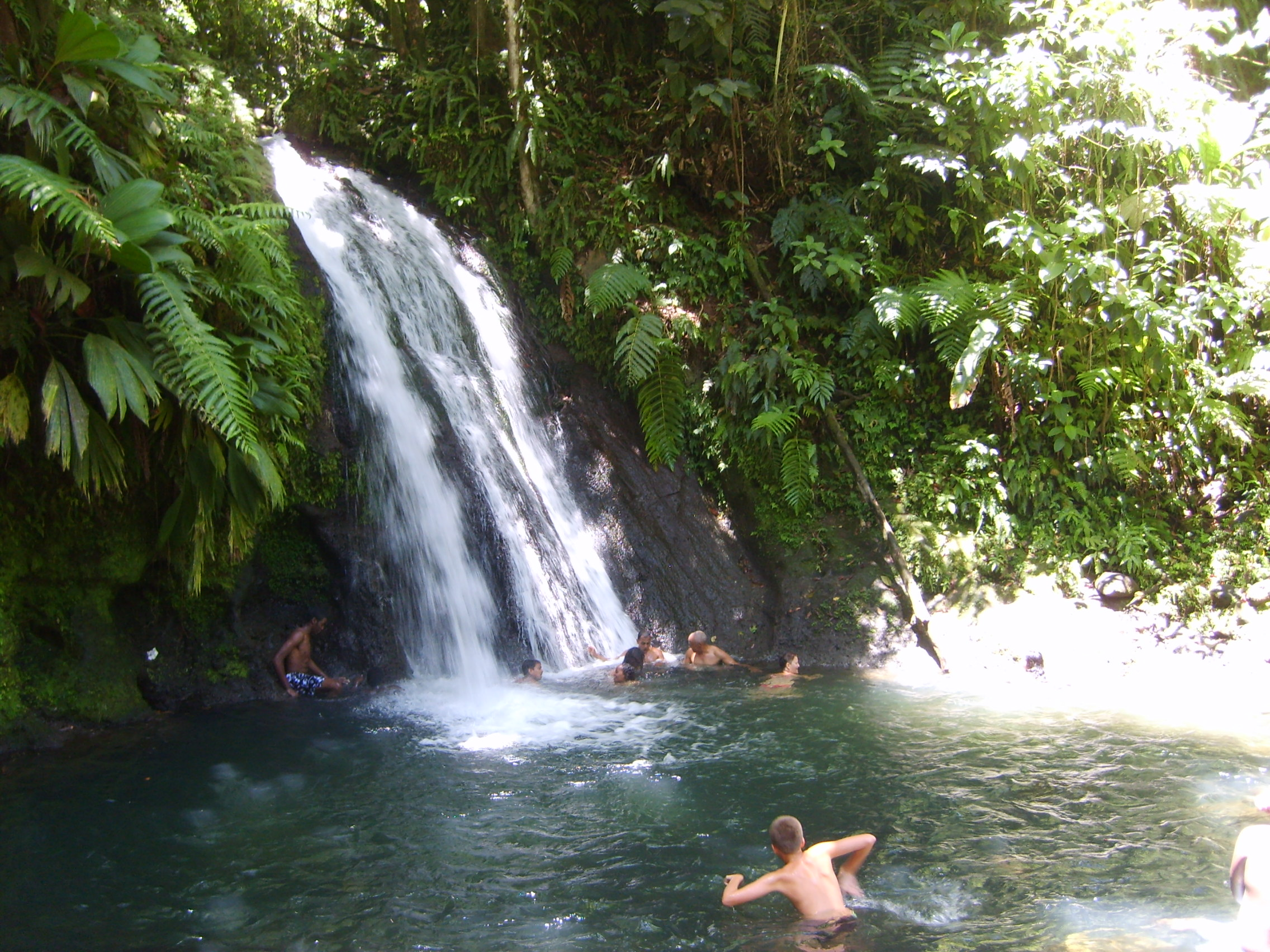 Cascade aux écrevisses sur la route des deux mamelles. (guadeloupe) France